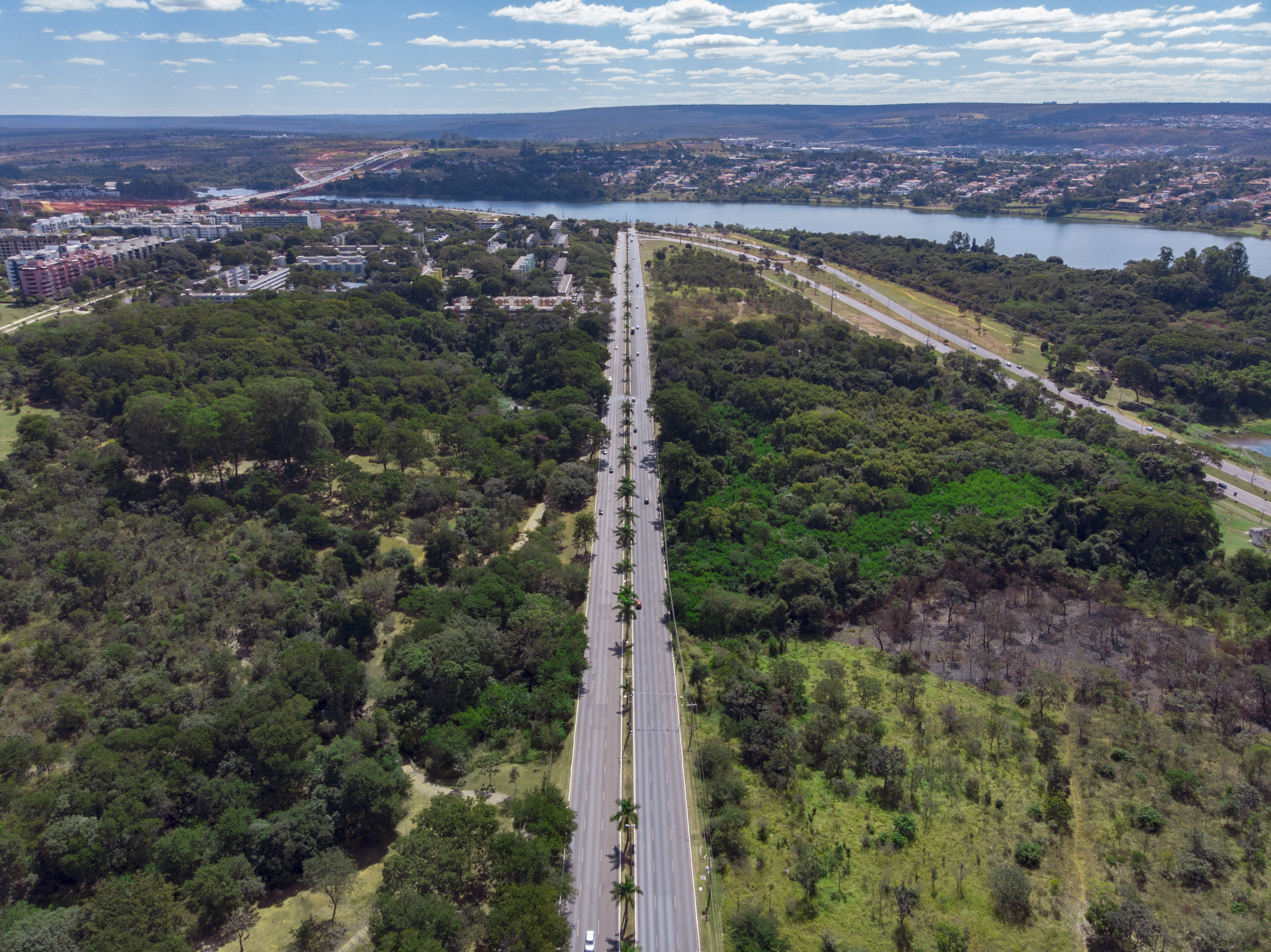 Parque Olhos D'água fotografado por um drone DJI Mavic Air a 120 metros de altura sobre a L2 Norte próximo à quadra 412 ao meio-dia.